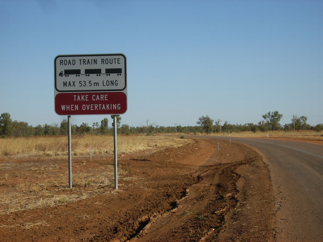 panneau "road train" en australie